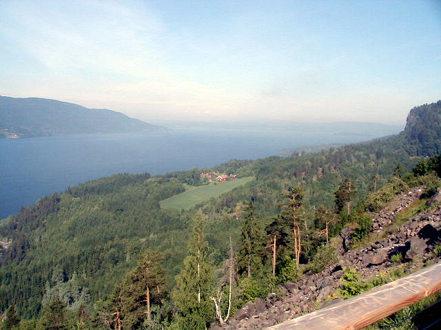 Utsyn mot Holsfjorden og Tyrifjordplatået fra nedstigningen over Solihøgda via E16 mot Hønefoss.